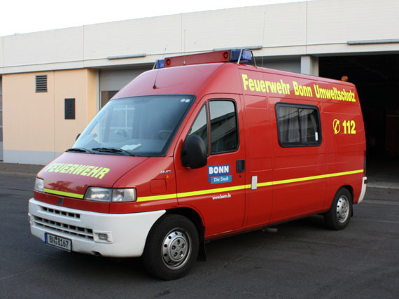 ABC-Erkundungswagen